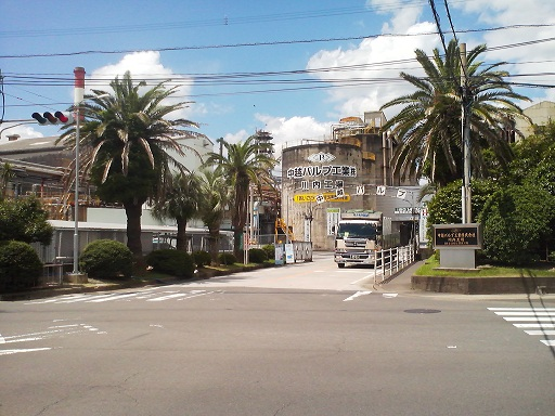 中越パルプ工業 川内工場の外観。